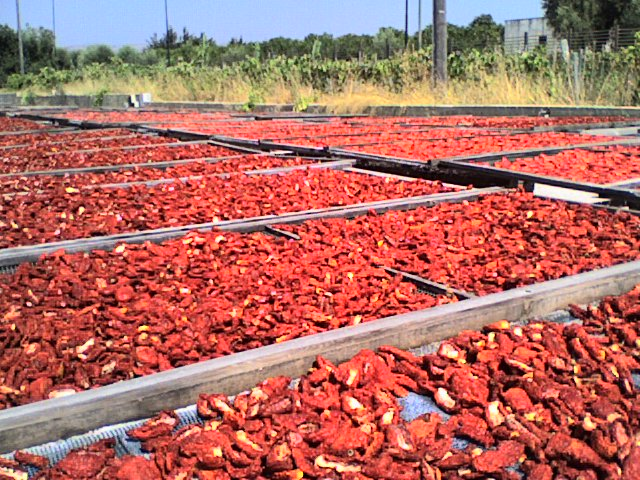 Pomodori secchi (stesi al sole di Sicilia ad essiccare)